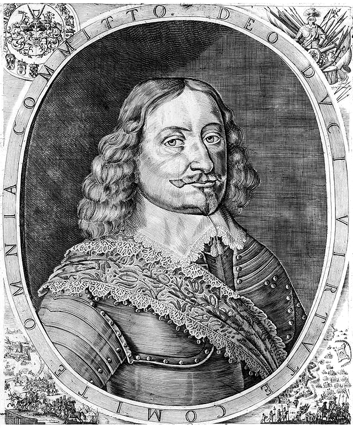 Яків Кеттлер, герцог Курляндії і Семигалії в Лівонії. Гравюра (39,7 x 28,2 см; аркуш 47,8 x 35,1 см). Зберігається в Рундальському палаці.